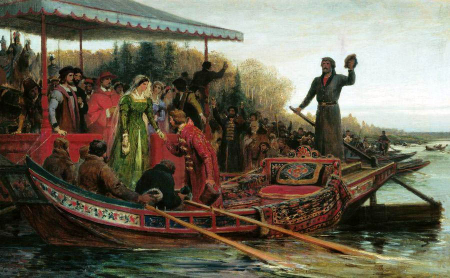 «Встреча царевны» - картина иллюстрирует встречу псковскими посадниками и боярами Софии Палеолог - невесты Великого князя Московского Ивана Великого. Картина Федора Бронникова «Дело уладилось: в июне 1472 года София выехала из Рима в сопровождении кардинала Антония и многих греков, а 1 октября пригнал во Псков гонцом Николай Лях от моря, из Ревеля, и объявил на вече: «Царевна переехала море, едет в Москву, дочь Фомы, князя морейского, племянница Константина, царя цареградского, внука Иоанна Палеолога, зятя великого князя Василия Дмитриевича, зовут ее София, она будет вам государыня, а великому князю Ивану Васильевичу жена, и вы бы ее встретили да приняли честно». Объявив это псковичам, гонец в тот же день поскакал к Новгороду Великому, а оттуда в Москву. Псковичи тотчас начали мед сытить и корм сбирать; посадники и бояре из концов отправились навстречу к царевне в Изборск, жили уже здесь целую неделю, как приехал из Дерпта гонец с приказом, чтоб ехали встречать ее на Немецкий берег; в шести насадах и со множеством лодок поехали посадники и бояре и встретили Софию в устье Эмбаха, вышли из судов и, наливши кубки и позолоченные роги вином и медом, били ей челом; она приняла это от них в честь и любовь великую о объявила, что сейчас же хочет ехать с ними дальше, чтоб поскорее покинуть немцев; посадник принял ее, всех приятелей ее и казну в свои насады, и поплыли к Русскому берегу. Перед Псковом была ей также честь большая: вышли к ней навстречу священники с крестами и посадники; принявши благословение от священников, челобитье от посадников и всего Пскова, София пошла в Троицкий собор с приятелями своими.»